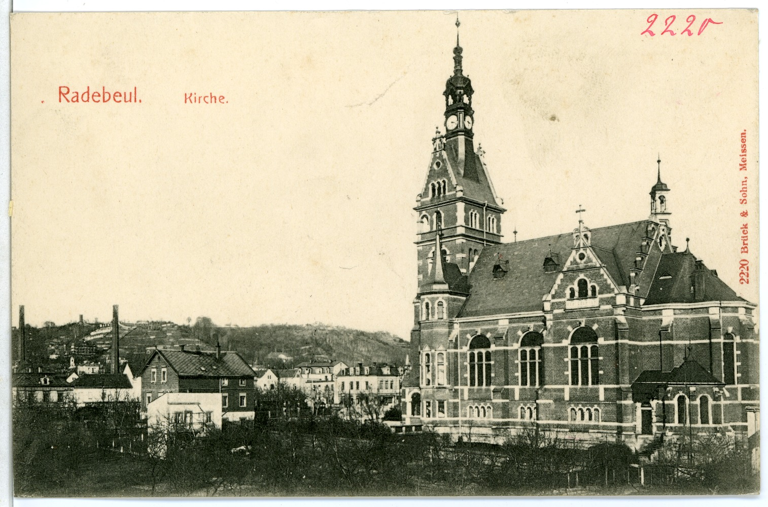 Radebeul; Kirche This postcard is from publisher Brück & Sohn in Meißen ( postcard has a unique number 02220 and is available in a higher resolution at the publisher. This images was uploaded in a cooperation project between Wikipedians and the publisher.